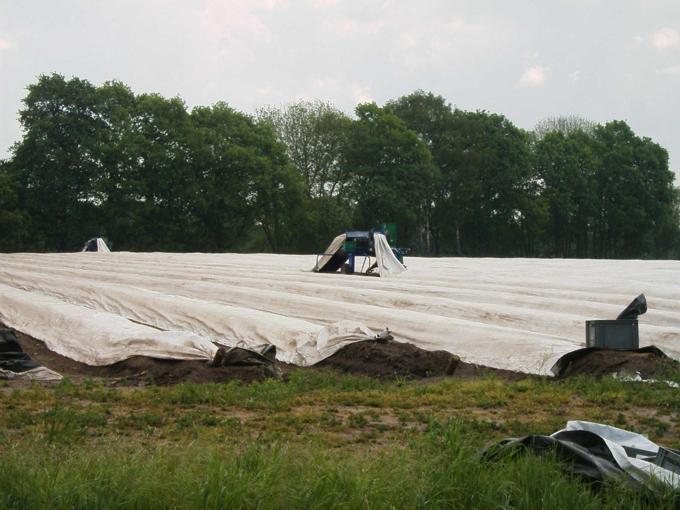 Spargel unter Folie, Erntehilfevorrichtung im Einsatz; Spargelfeld in Klein Haddorf, an der Straße von Ohne nach Bilk; Wettringen im Münsterland, Deutschland